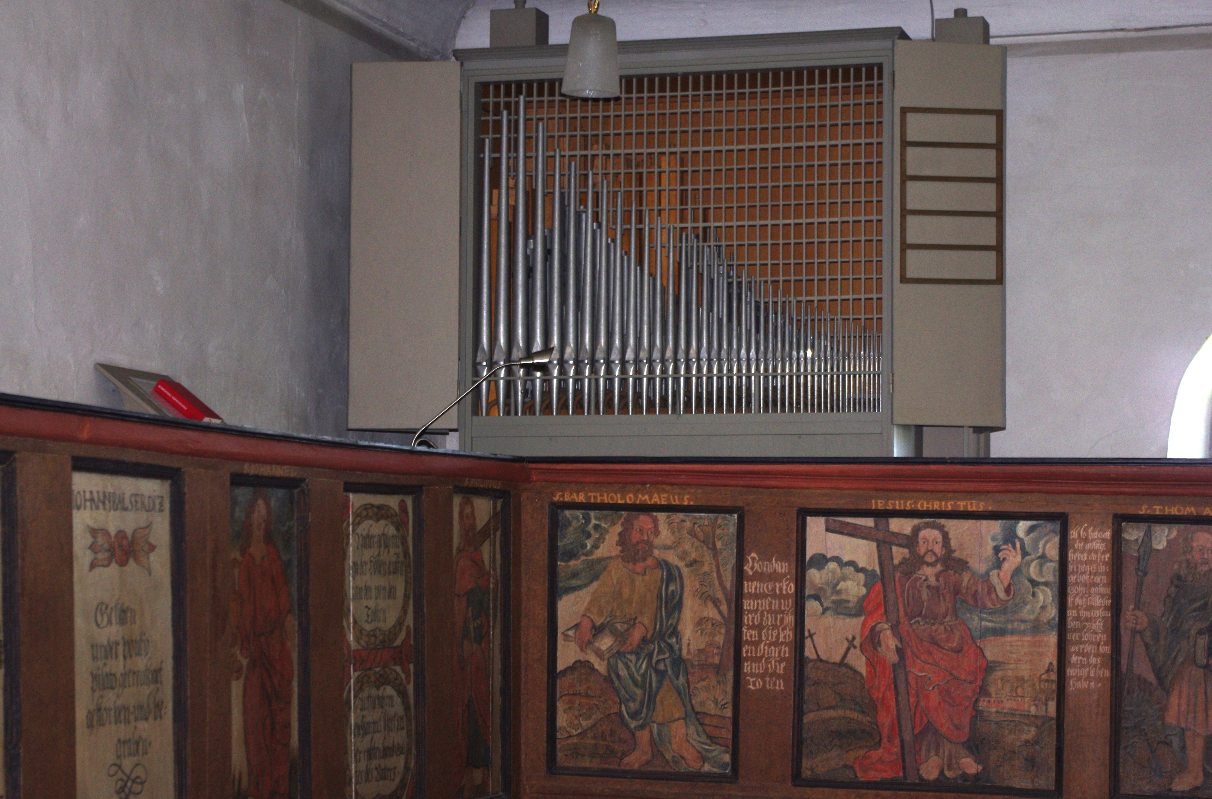 Orgel der Ev. Kirche Odenhausen